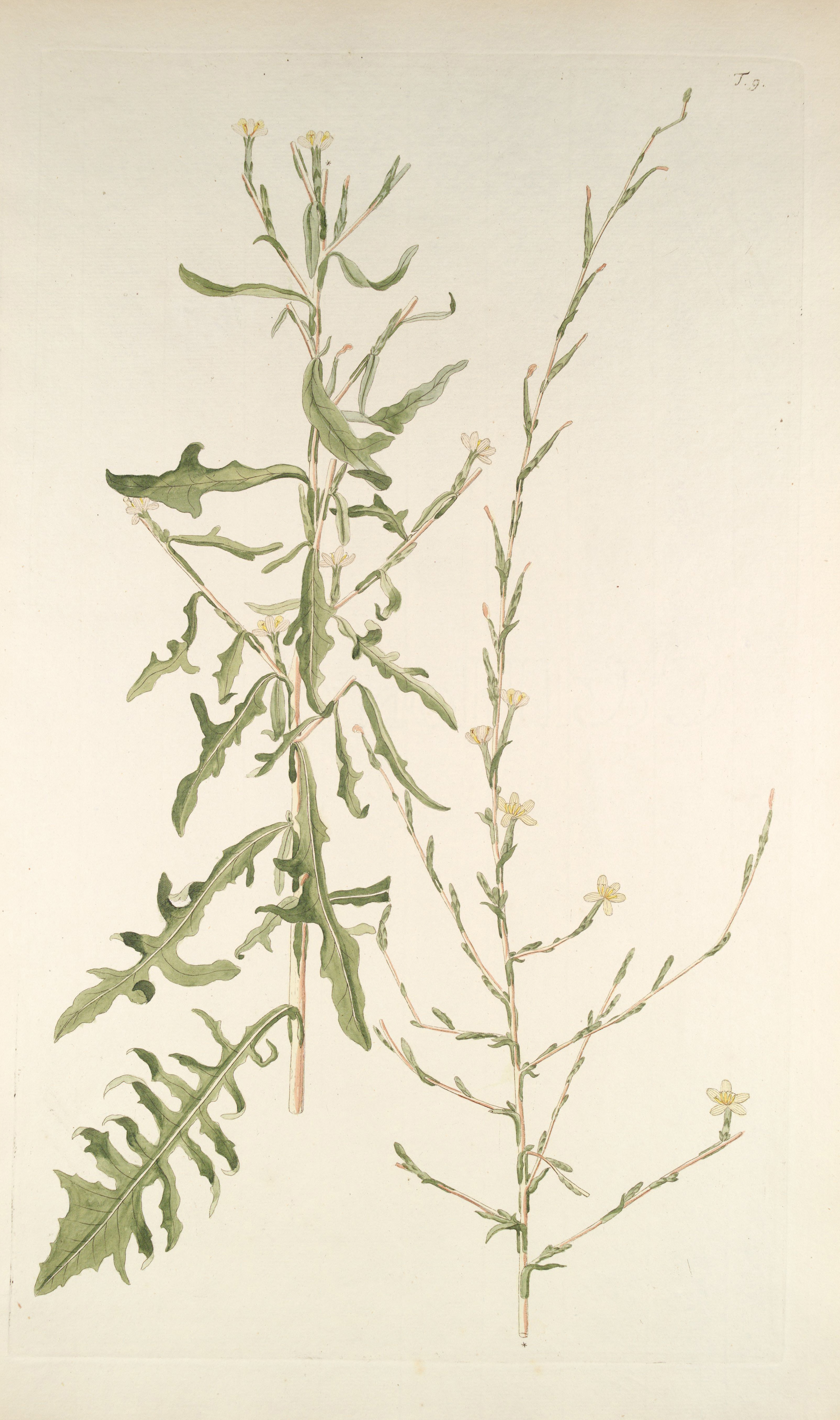 Legende: Mittlerer Teil der Pflanze. Oberer Teil der Pflanze.